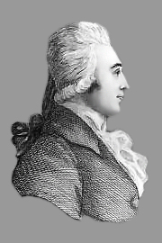 Paul Wranitzky (austrian composer)